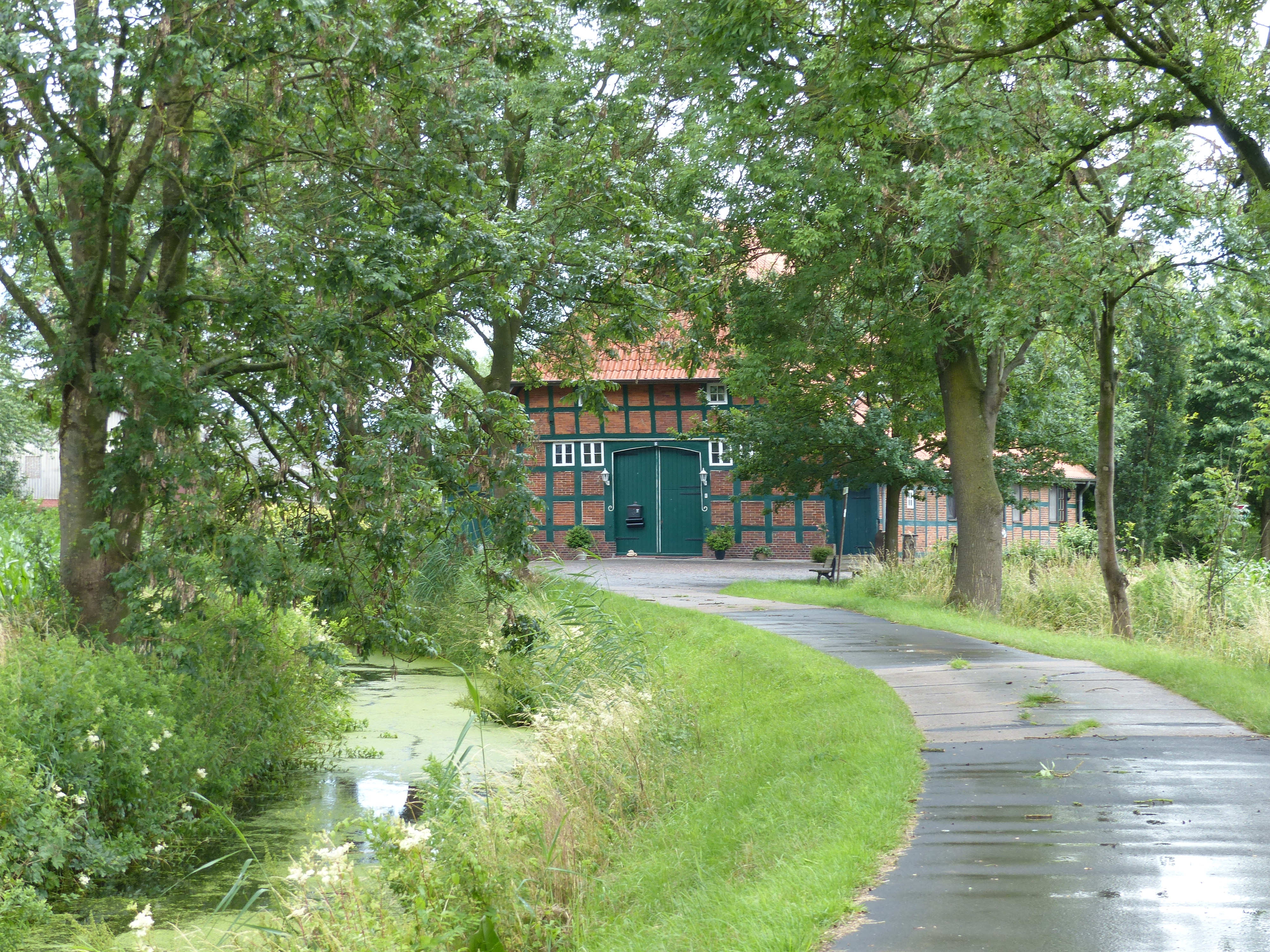 Bauernhaus an der Ollen in Lemwerder-Altenesch